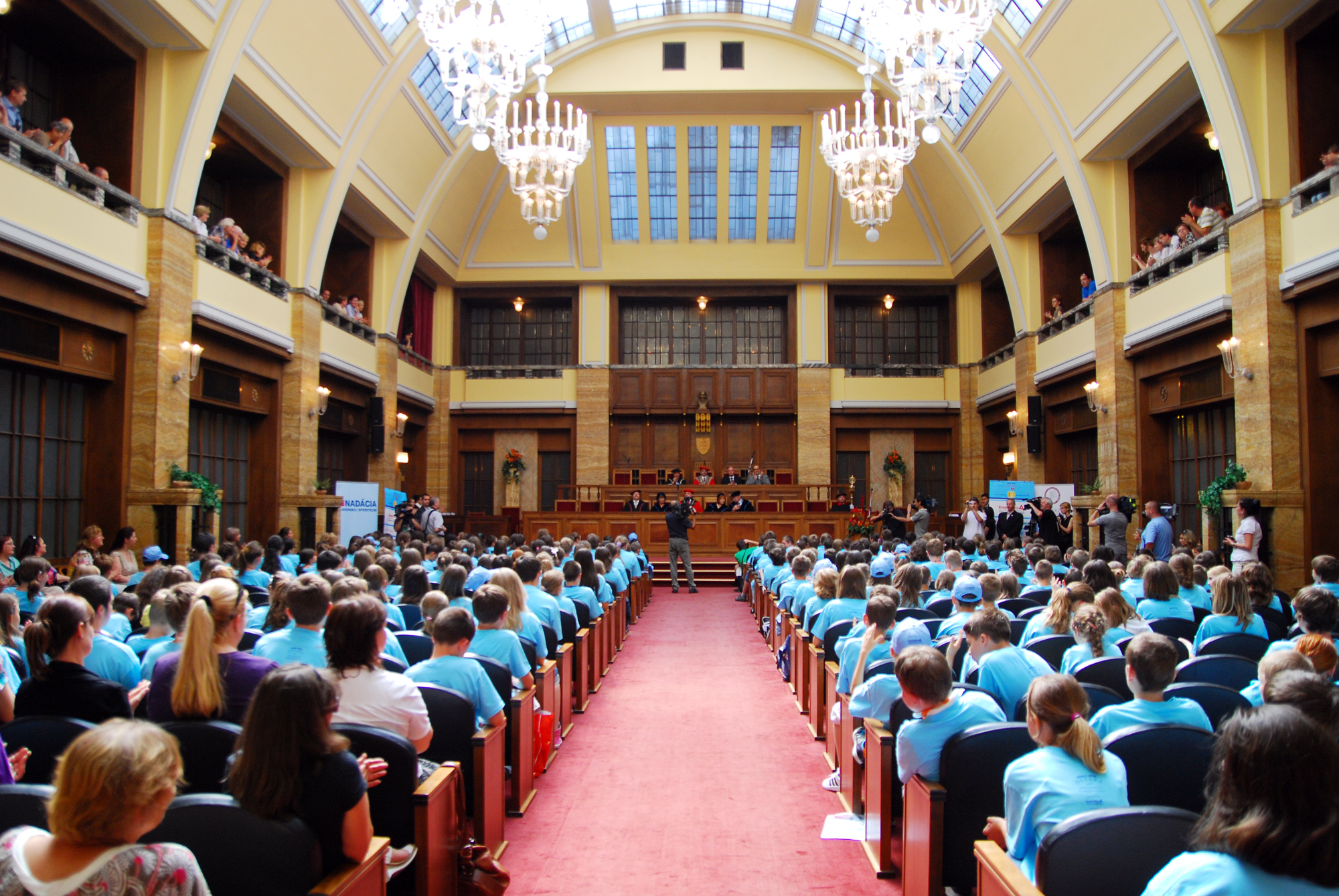 Slávnostné otvorenie Detskej univerzity Komenského 2011